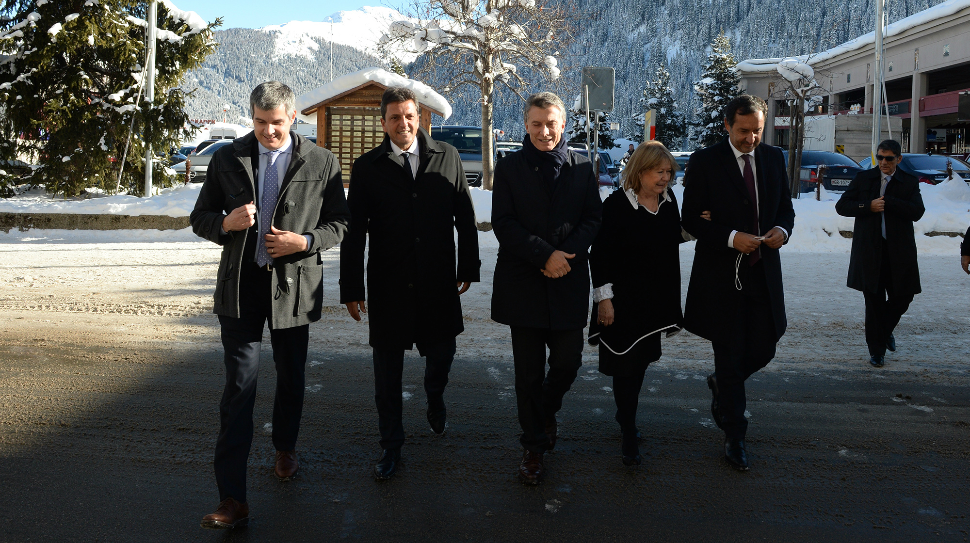 El presidente Mauricio Macri mantiene una intensa agenda de reuniones con jefes de Estado y empresarios con el objetivo de atraer inversiones para el país. Mauricio Macri se encuentra en Suiza en el Foro Económico Mundial de Davos. El presidente viajó acompañado por el diputado Sergio Massa (Frente Renovador), el dirigente opositor elegido por el Gobierno para formar parte de la comitiva.